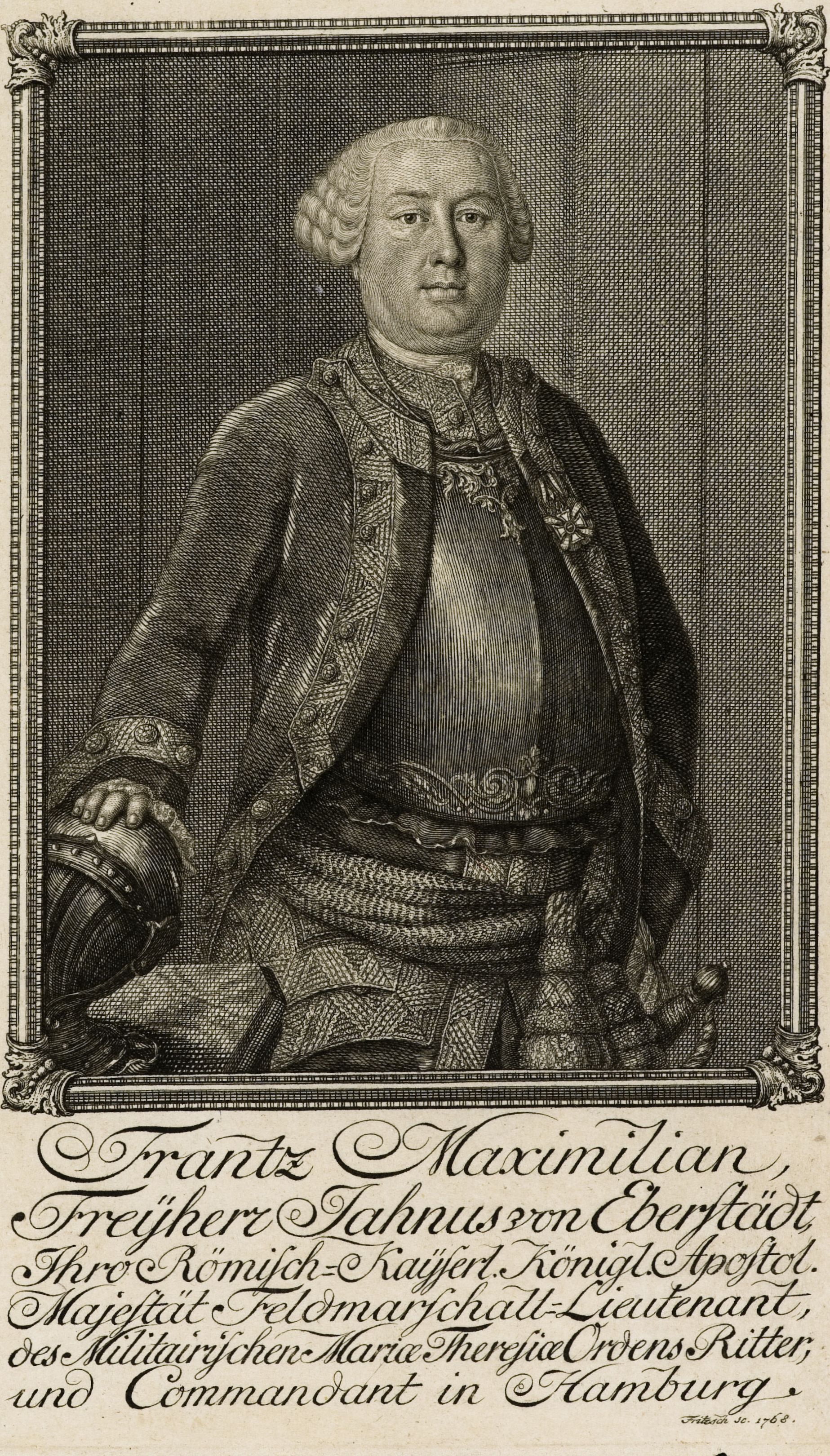 Frantz Maximilian Freÿherr Jahnus von Eberstädt, Ihro Römisch-Kaÿserl[ichen] Königl[ichen] Apostol[ischen] Majestät Feldmarschall-Lieutenant, des Militairischen Mariae Theresiae Ordens Ritter, und Commandant in Hamburg